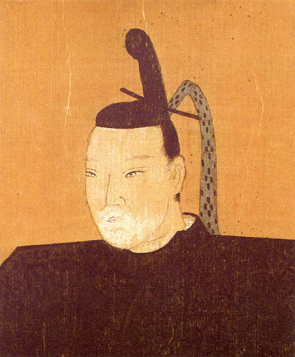 堀尾忠氏の肖像(部分)。